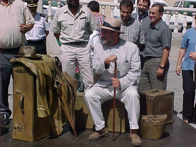 Urculo y "Equipaje de Ultramar"